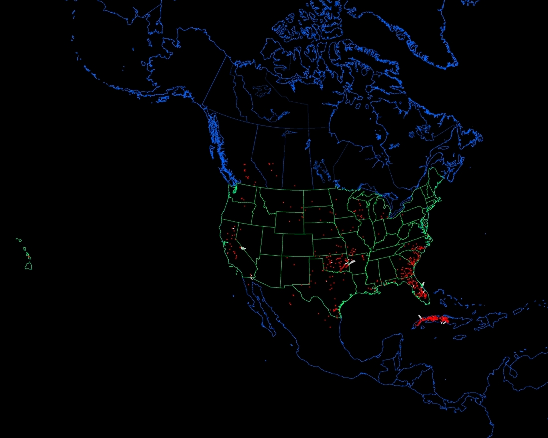 Analisi per il giorno 20 febbraio 2007 degli incendi negli U.S.A.. Fonte